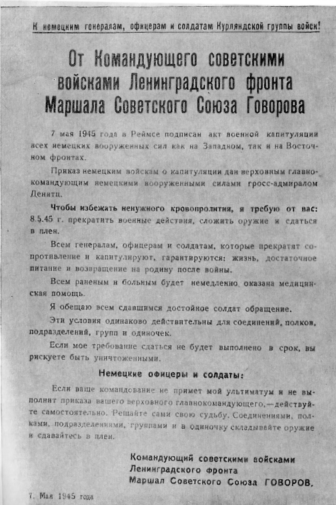 Cоветский ультиматум группе армий «Курляндия» на русском языке